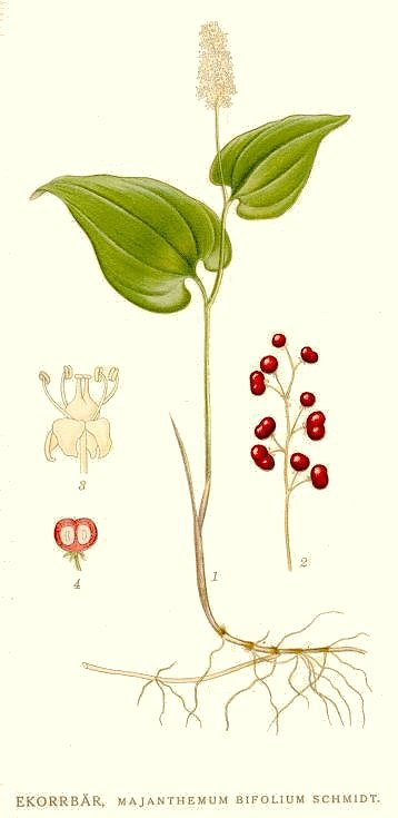 Maianthemum bifolium (L.) F. W. Schmidt Original Description Ekorrbär, Majanthemum bifolium Schmidt.